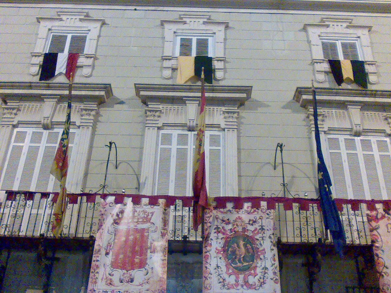 Balconada del Ayuntamiento de Orihuela (Palacio del Marqués de Arneva), engalanada para el Mercado Medieval.